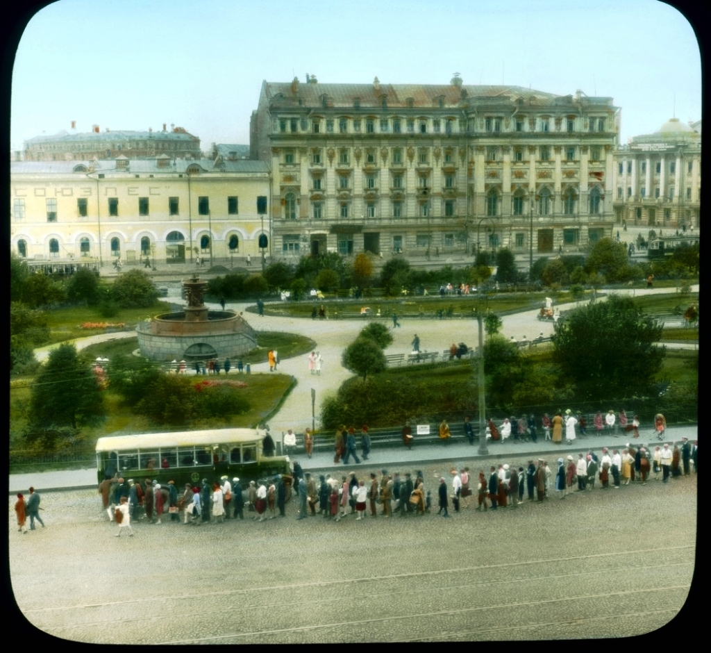 Москва. Площадь Свердлова (Театральная)